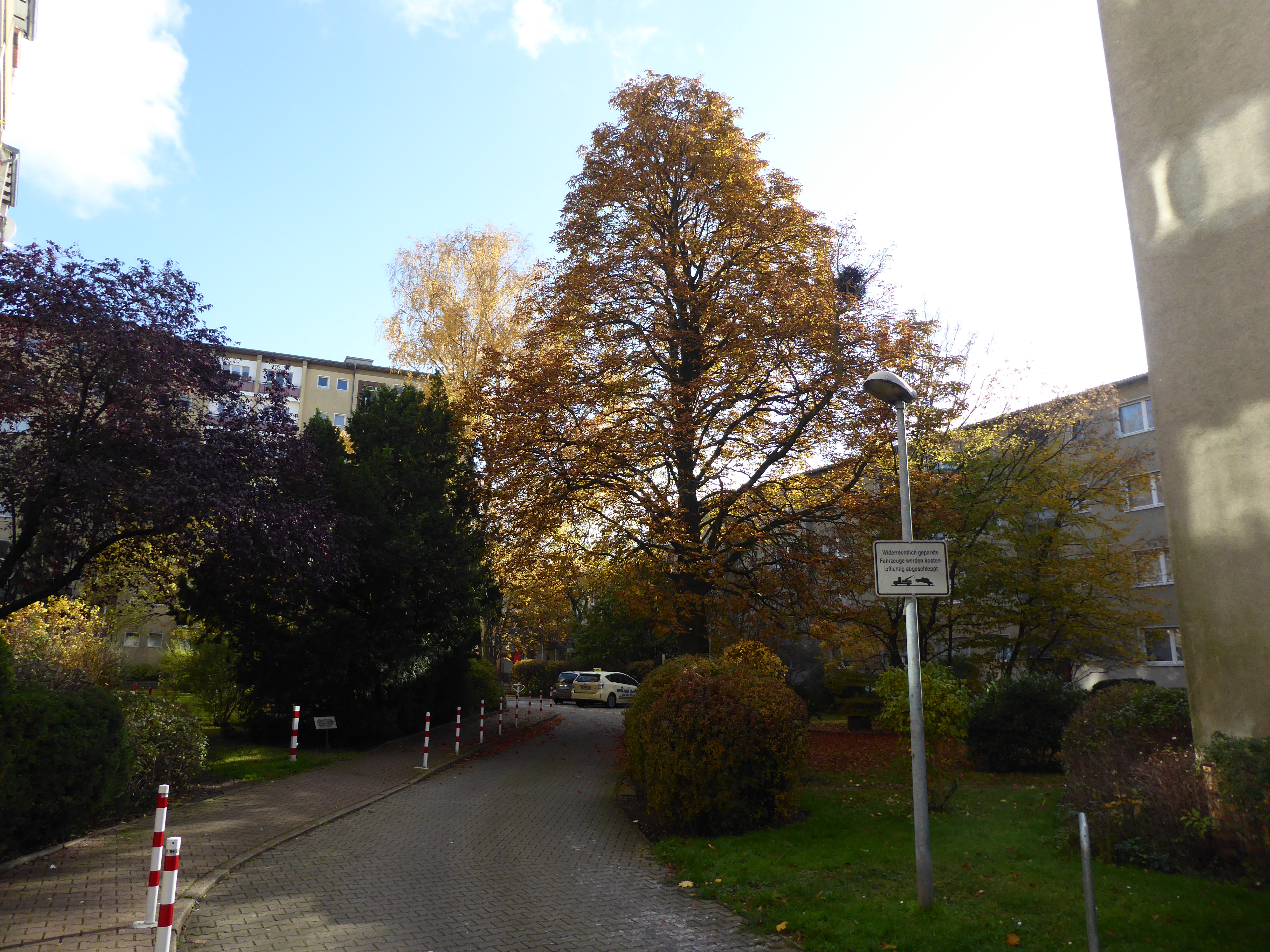 Berlin-Gesundbrunnen Prinzenallee 46a